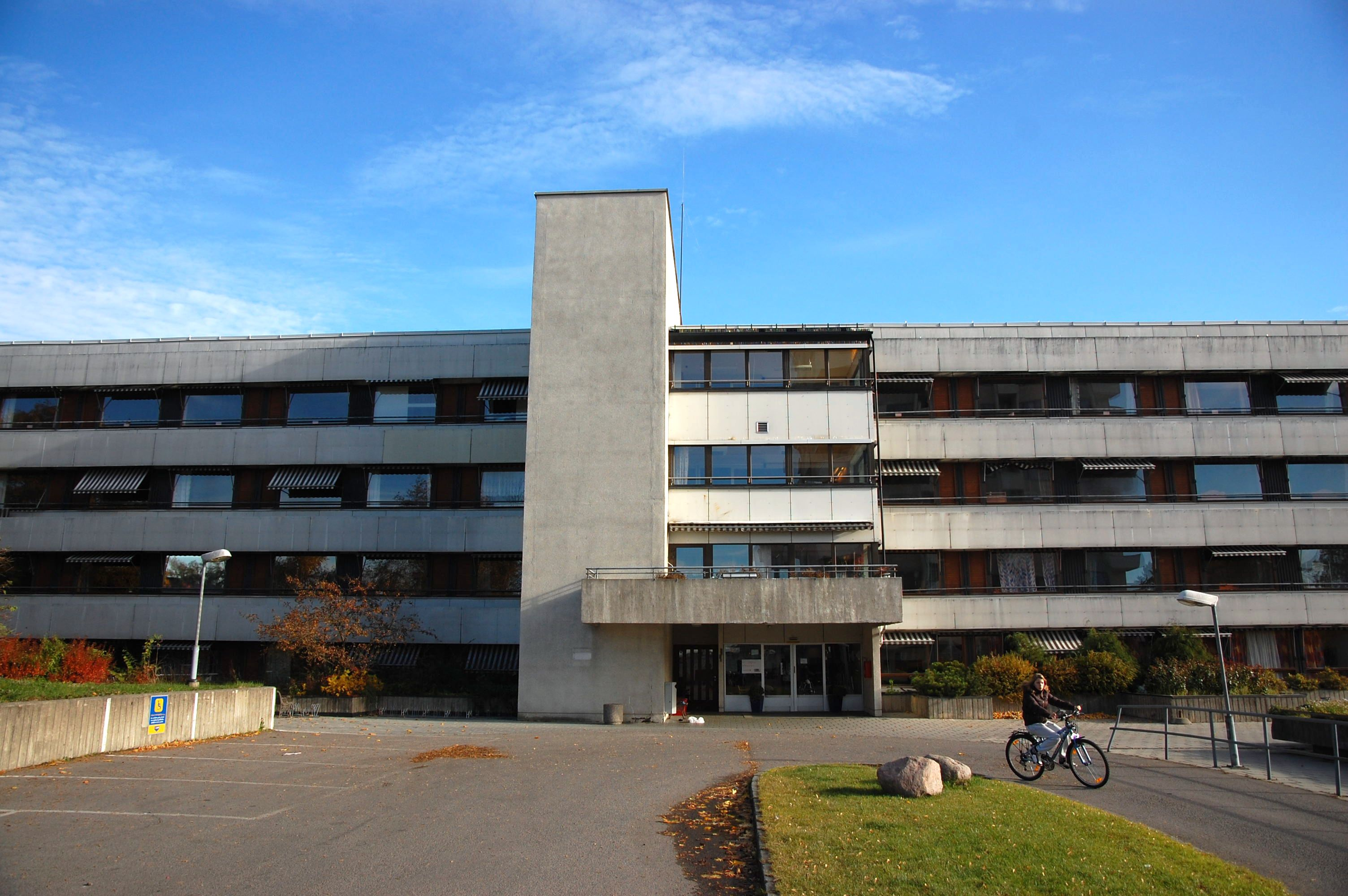 Økern alders- og sykehjem på Økern i Oslo, tegnet i 1955 av arkitektene Sverre Fehn og Geir Grung. For sin tegning av bygningen fikk arkitektene i 1961 Houens fonds diplom. Økernveien 151